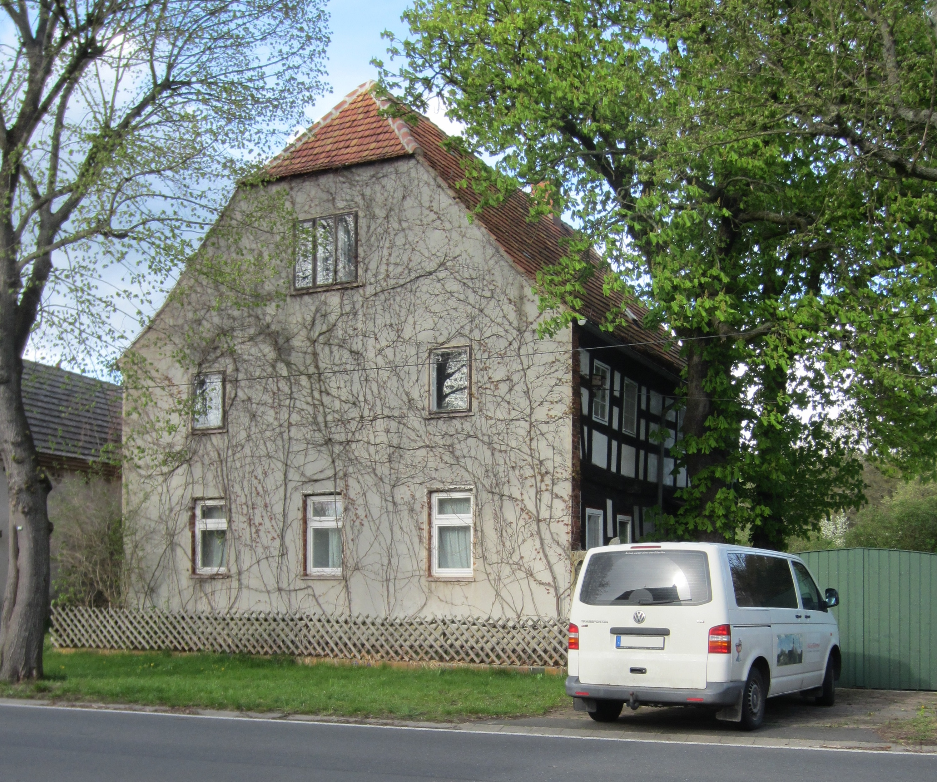 Falkenberg/Elster, Ortsteil Kleinrössen, denkmalgeschütztes Pfarrhaus Dorfstraße 13, Ansicht von Westen